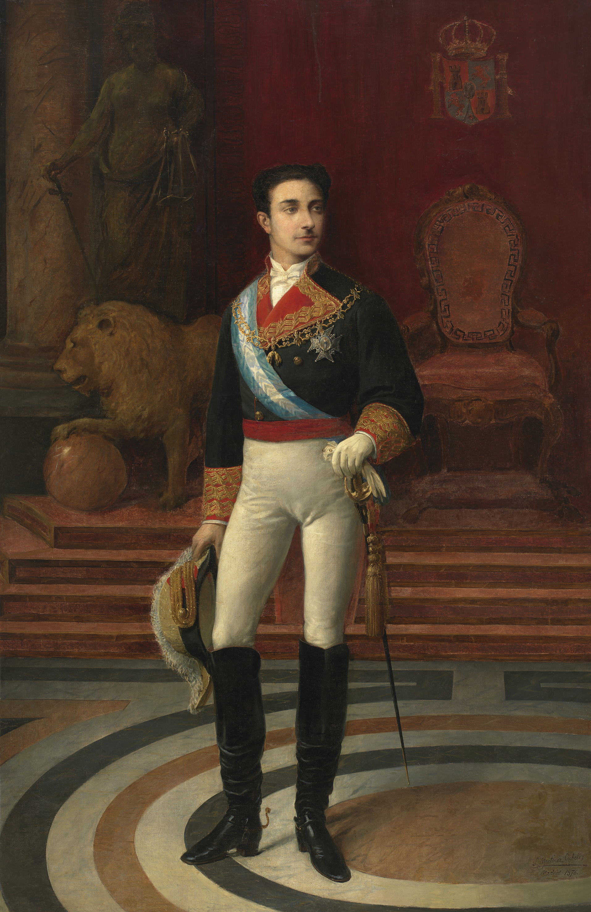 Retrato del rey Alfonso XII de España (1857-1885), vestido con uniforme de gala de capitán general y luciendo numerosas condecoraciones, como el collar de la Orden del Toisón de Oro o la gran cruz y la banda de la Orden de Carlos III.